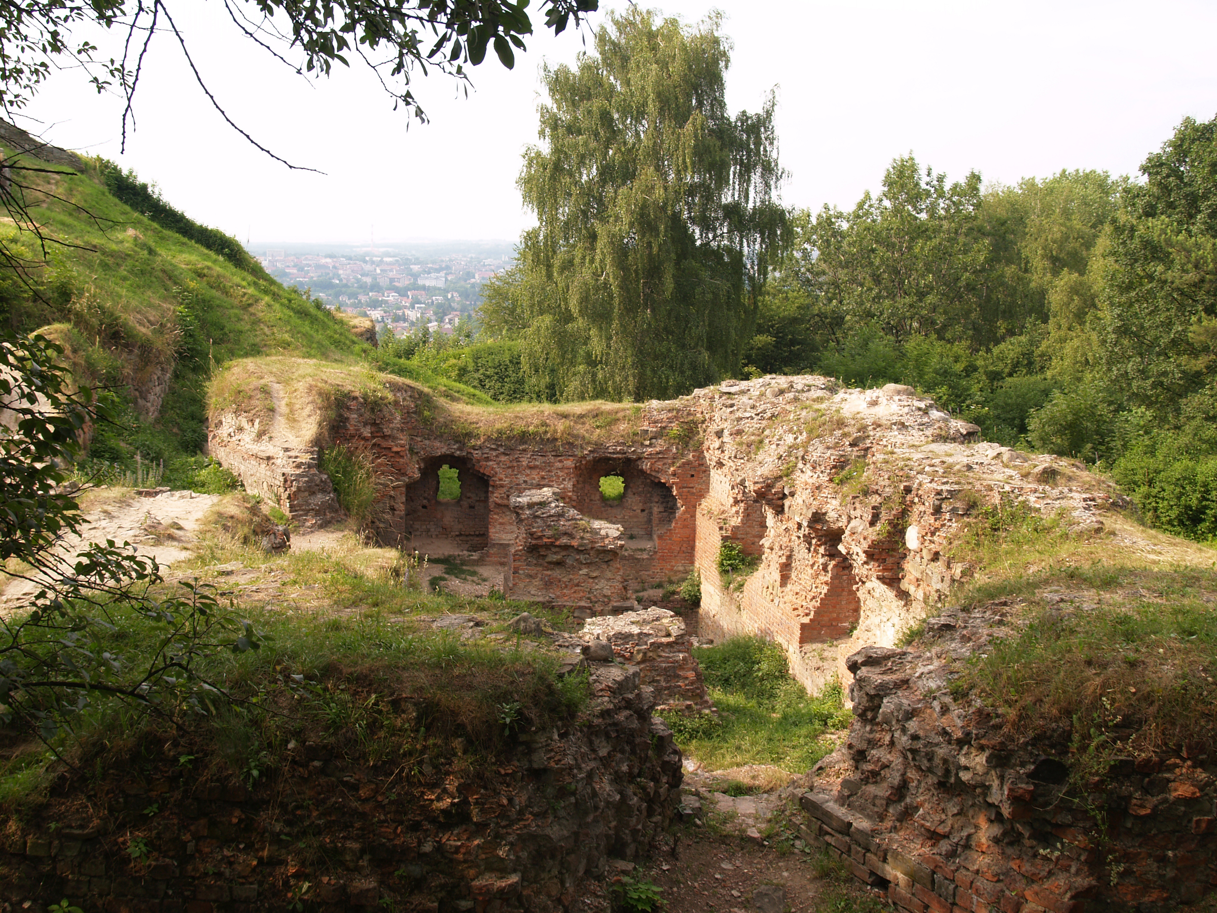 Tarnów, ul. Wypoczynkowa - ruiny średniowiecznego zamku na Górze Świętego Marcina (zabytek nr A-119 z 5.10.1976)